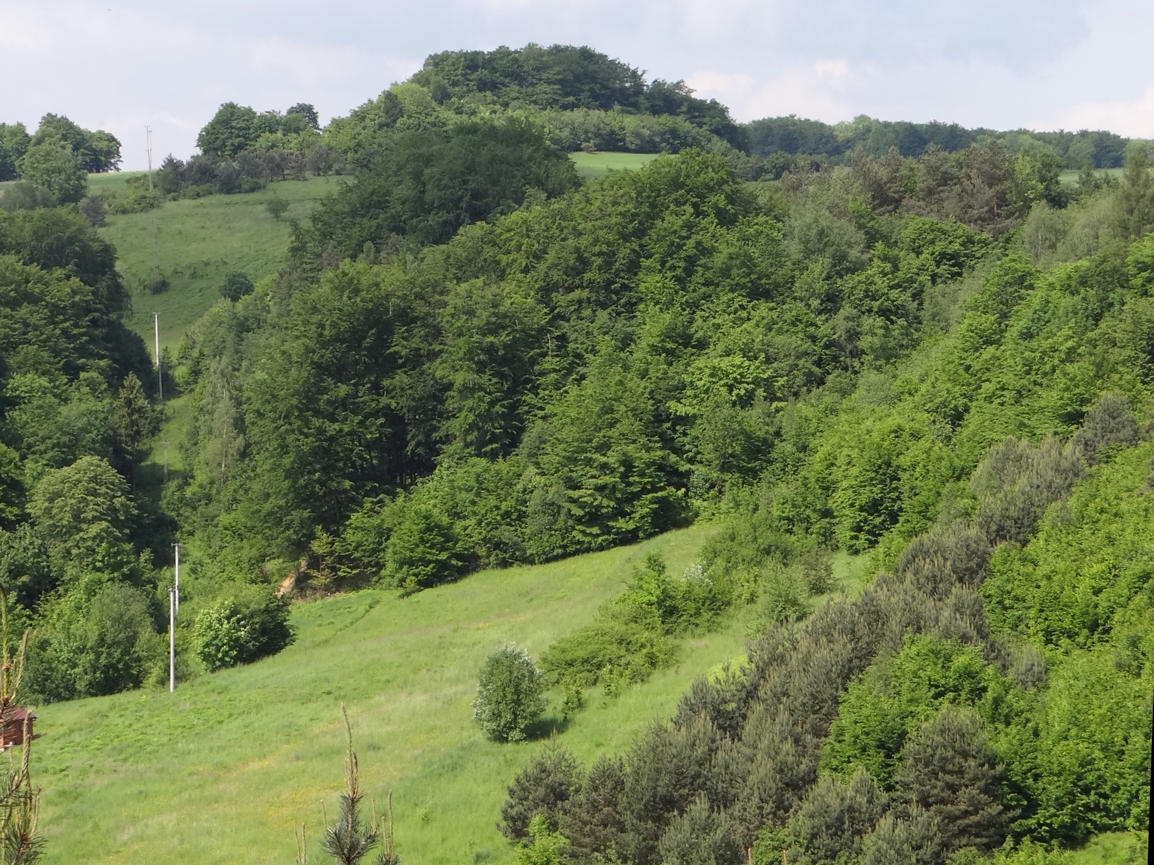 Dolina Szklarki